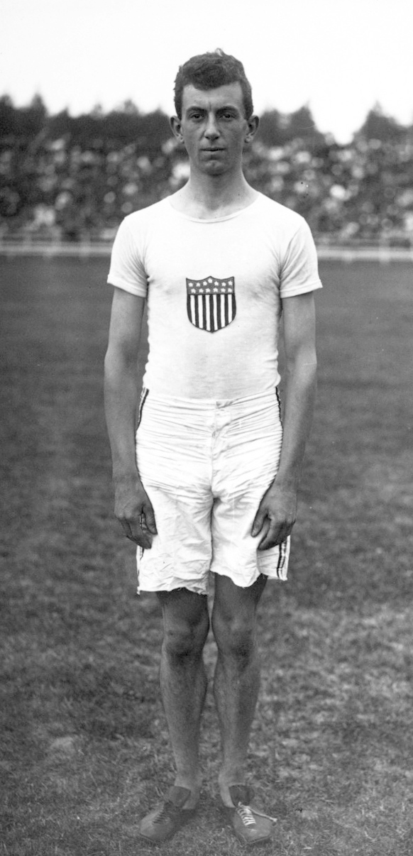 23-7-12, Reims, Walter Mac Clure, américain, 5000 mètres [portrait] : [photographie de presse] / [Agence Rol]